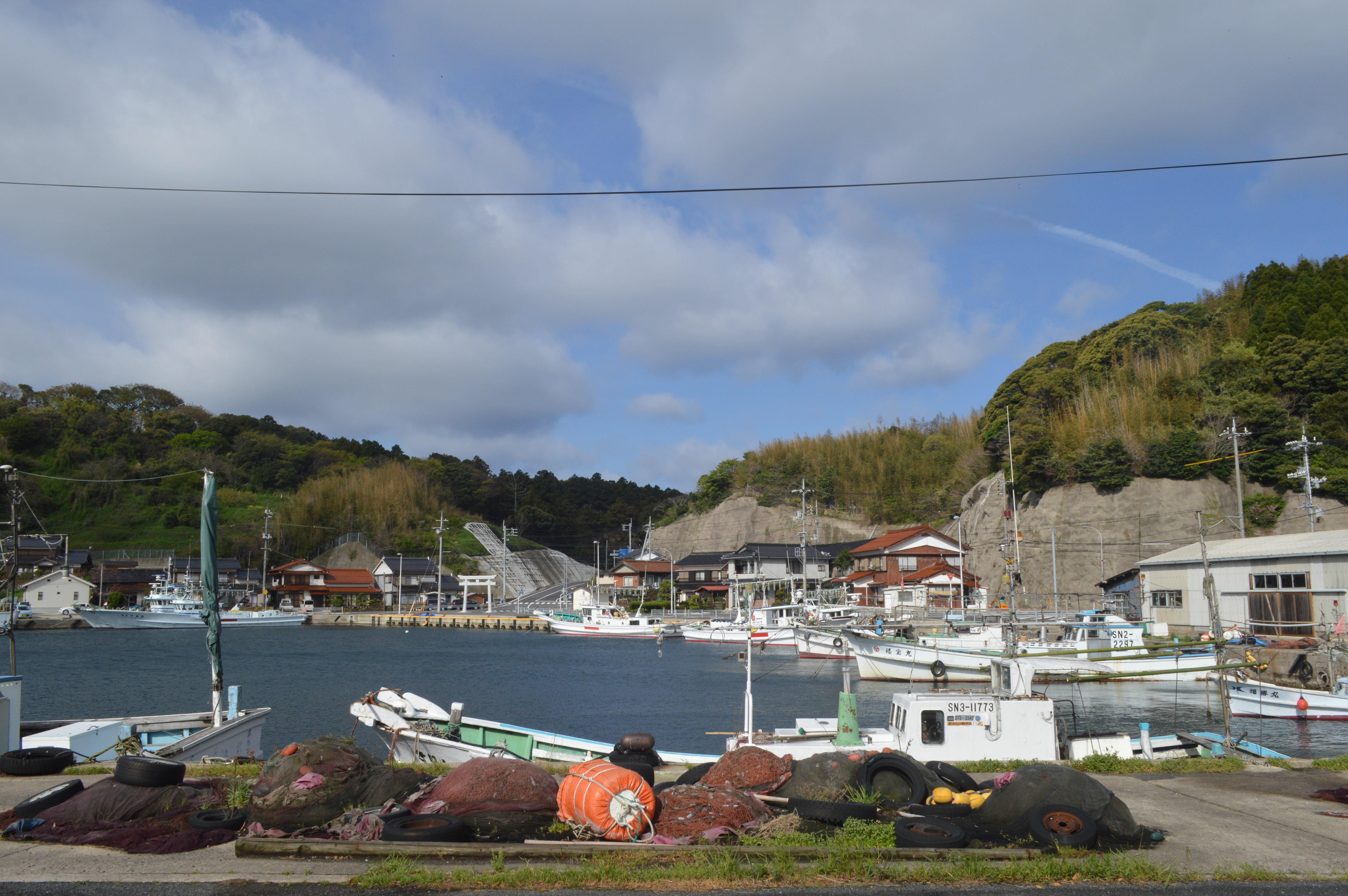 島根県隠岐郡中ノ島町にある浦郷港。